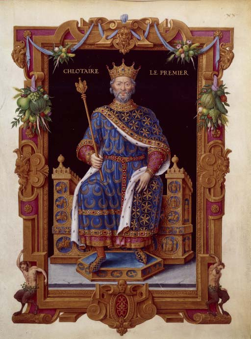 Clotaire Ier selon Jean Du Tillet, Recueil des rois de France (fr. 2848, f°20). Bibliothèque Nationale de France. Peinture réalisée d'après la statue en métal de Clotaire Ier, représentant le roi assis sur un trône tenant un sceptre et la tête couronnée. La statue fut érigée après 1150 dans l'église Saint-Médard de Soissons. Ce monument fut détruit par les huguenots. Le roi est vêtu avec une dalmatique bleue semée de croissants d'argent.